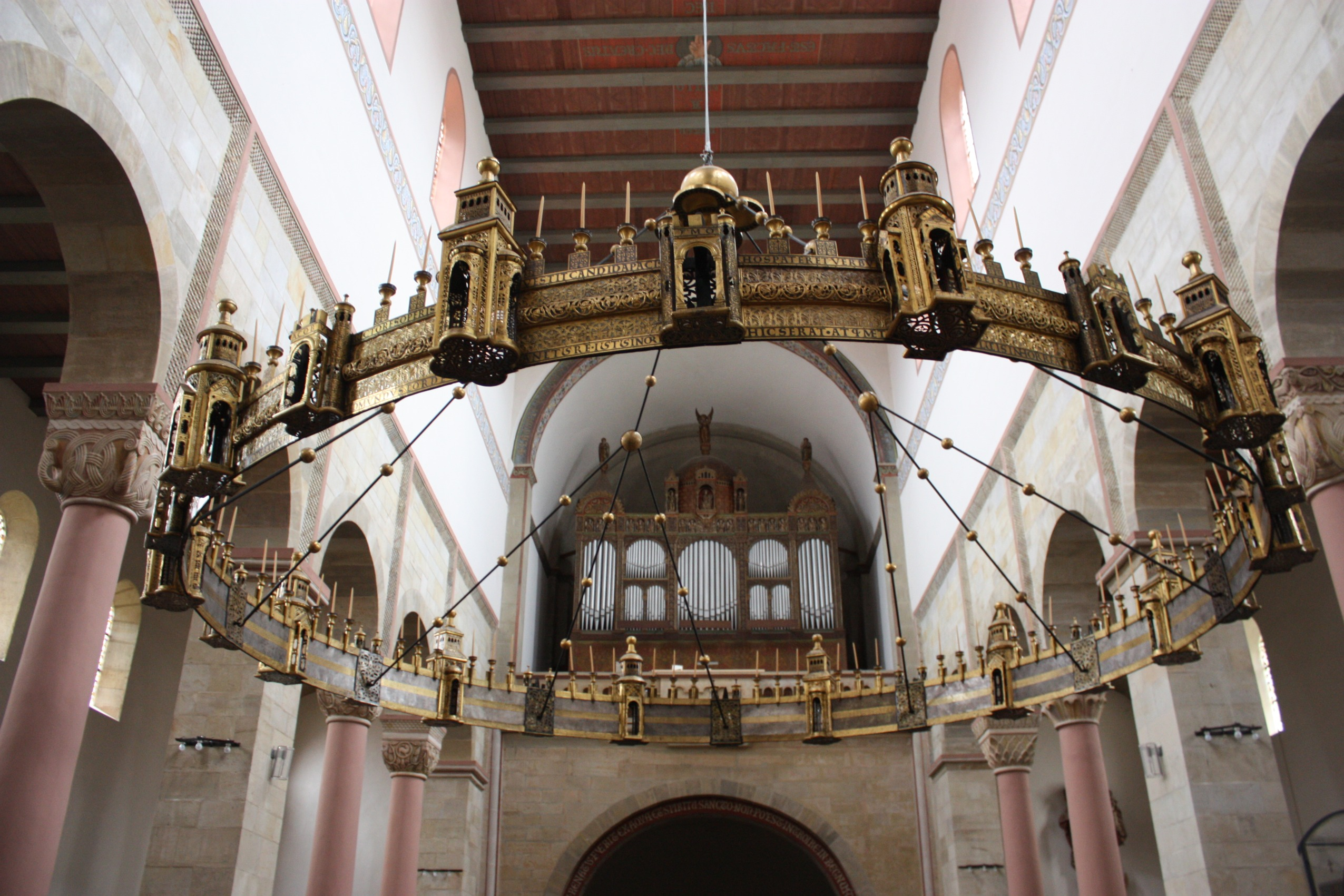 Hildesheim, Basilika St.Godehard - Radleuchter